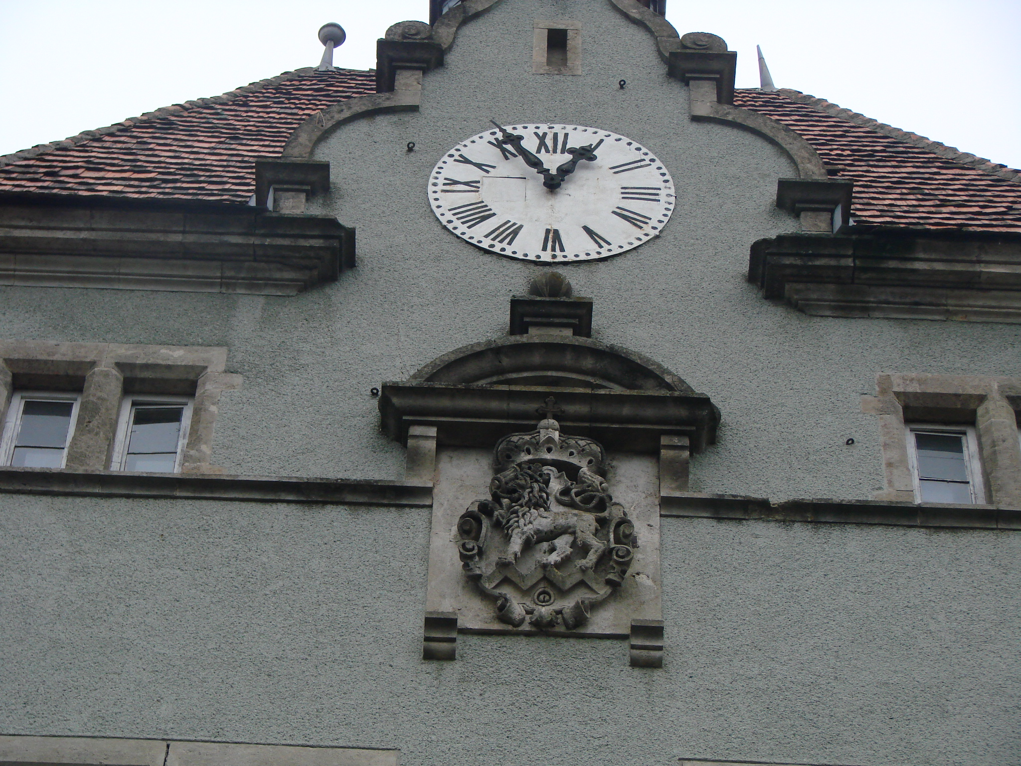 герб Шенборнів на фасаді палацу